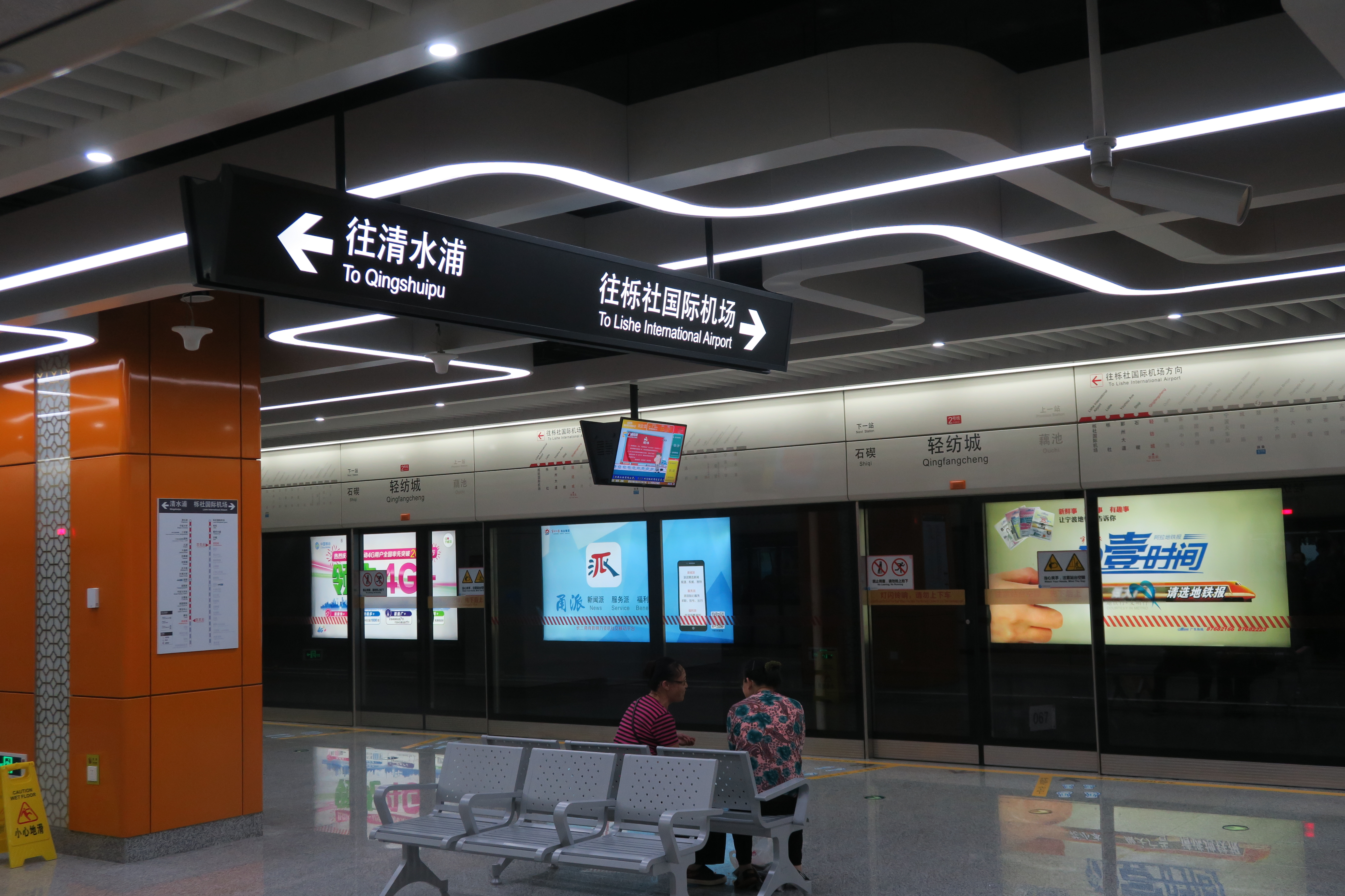 宁波地铁轻纺城站